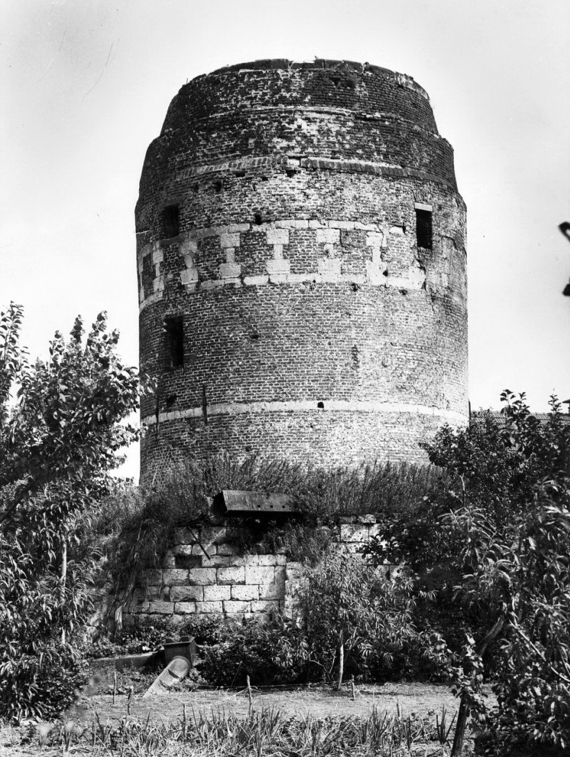 Korenmolen: exterieur